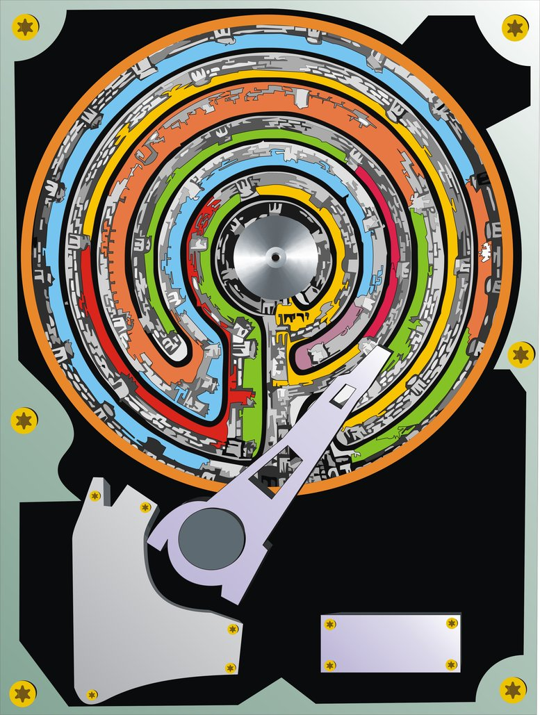 Hard Disk